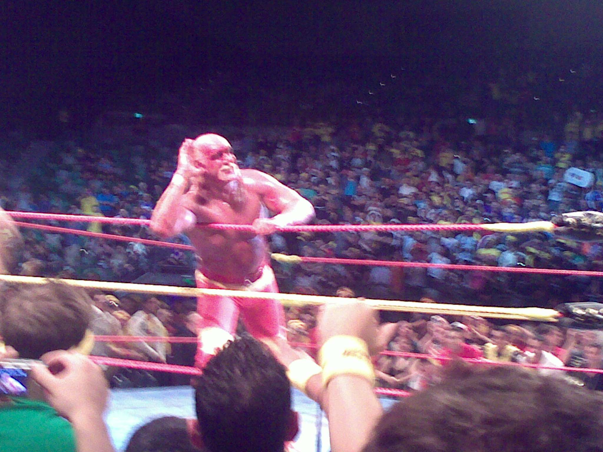 wrestling legend hulk hogan